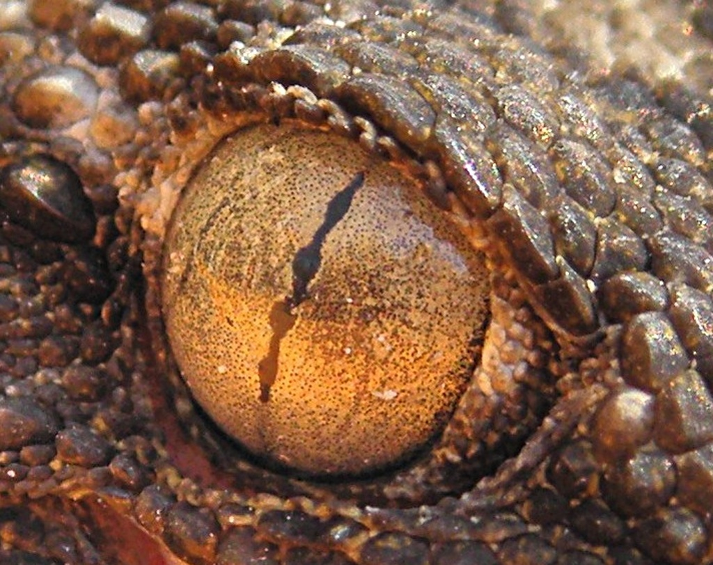 Œil de gecko photographié à Nice (France)